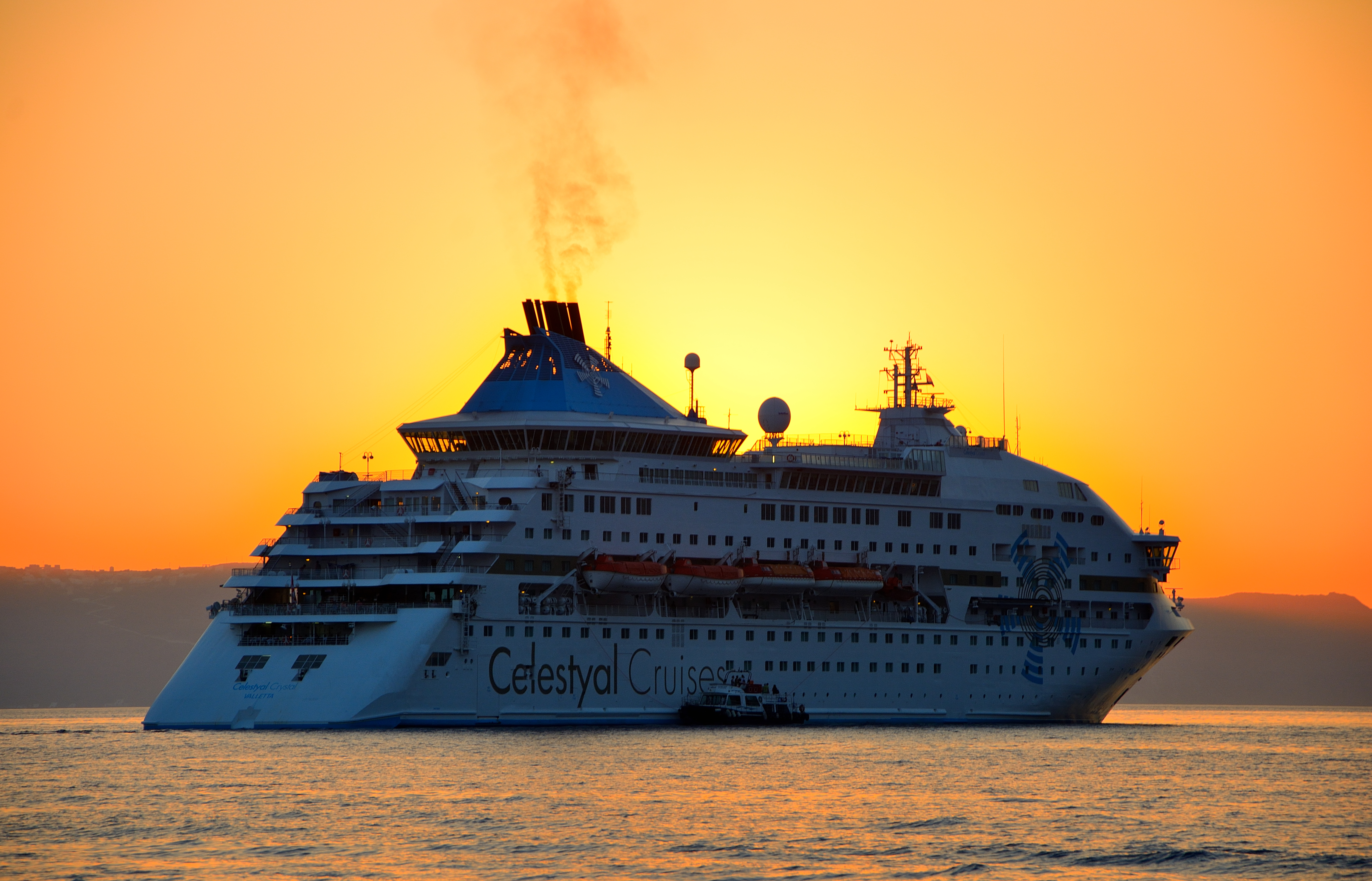 Celestyal Crystal fondeado en Santorini